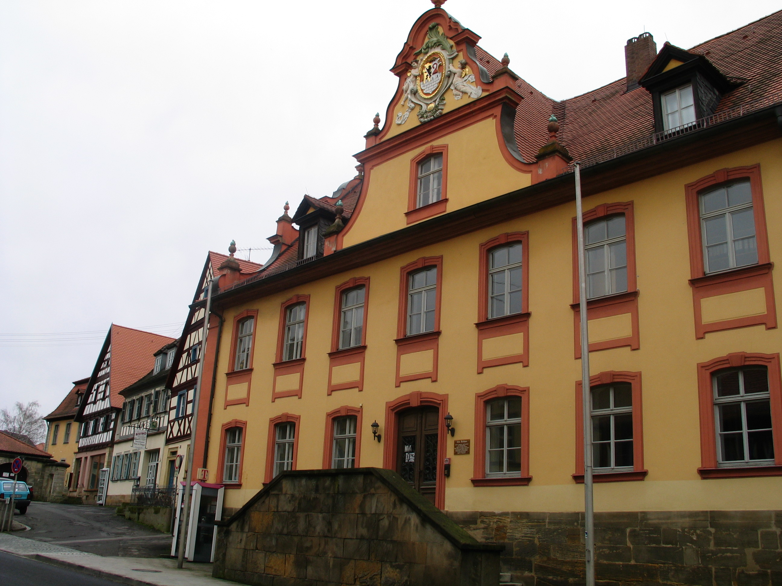 de Scheßlitz: Altes Rathaus. en Scheßlitz: Ancient Town Hall. it Scheßlitz: Il municipio historico.